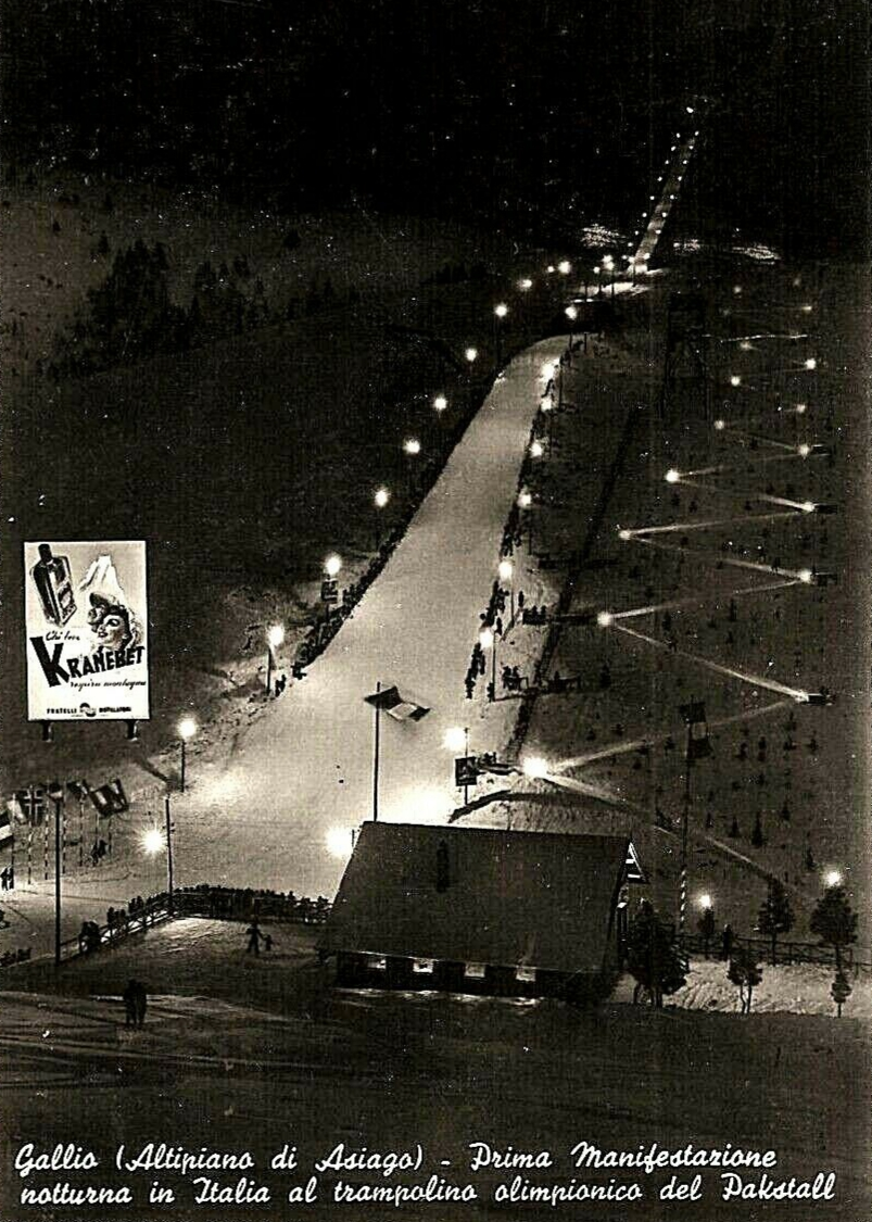 Gallio (Altipiano di Asiago) - Prima Manifestazione notturna in Italia al trampolino olimpionico del Pakstall